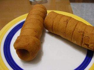 Gajorros